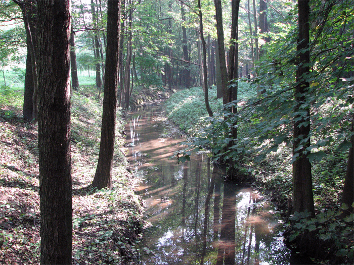 Riparian area of Kłodnica in Katowice Panewniki (2010)